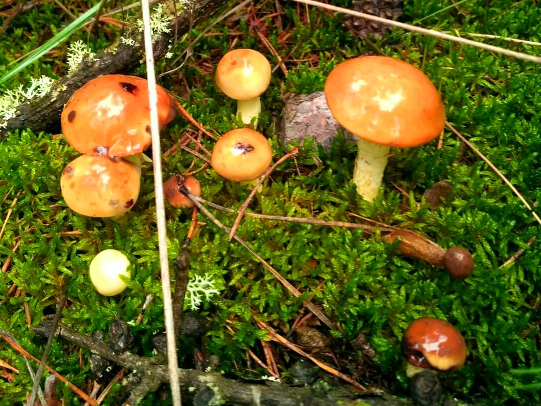 Suillus. Eastern Siberia